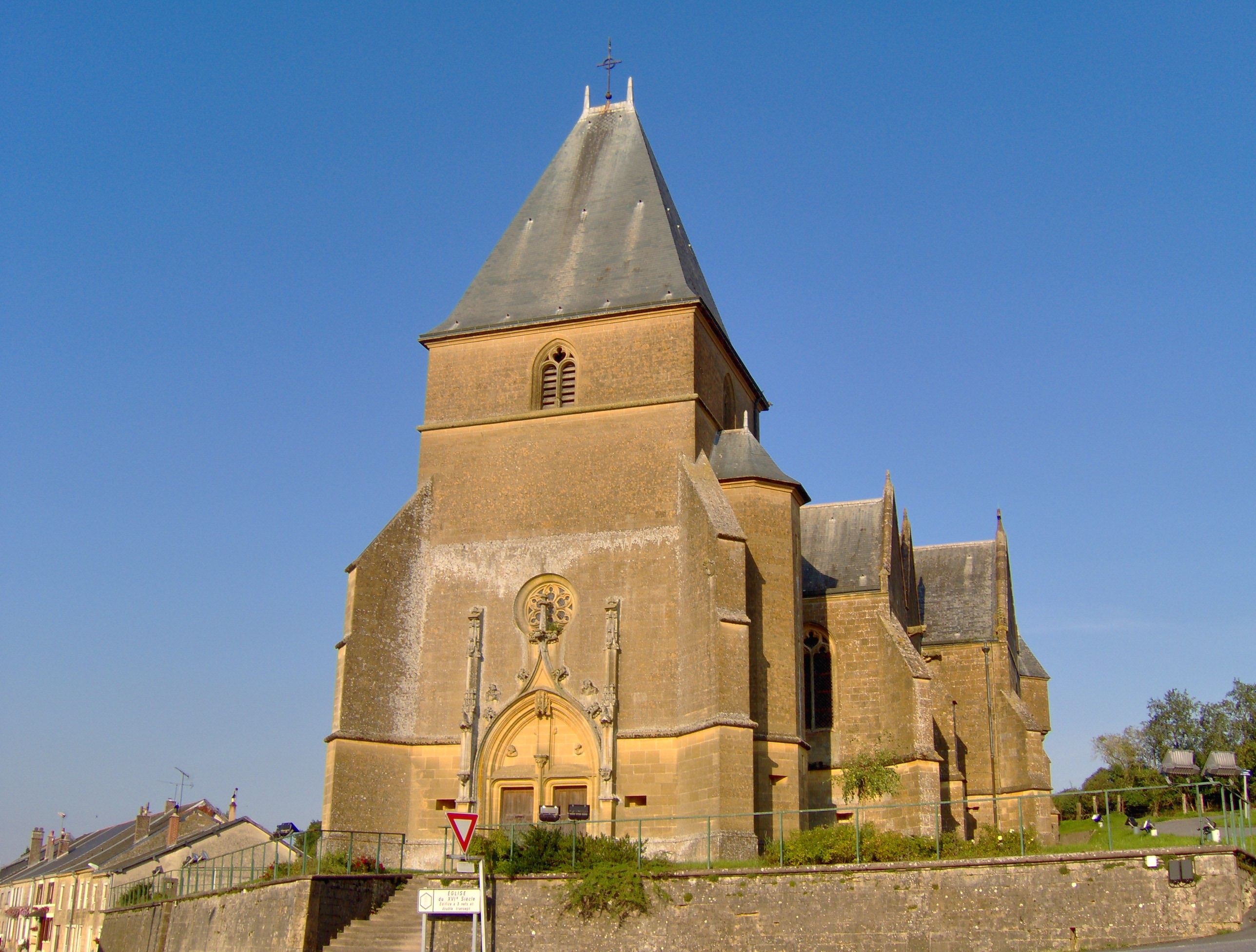 Eglise de Tannay, Ardennes, France